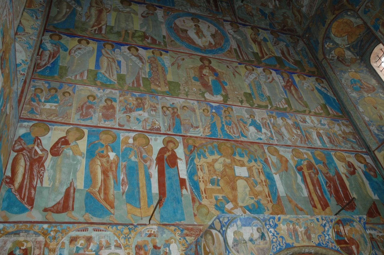 Frescoes (13)